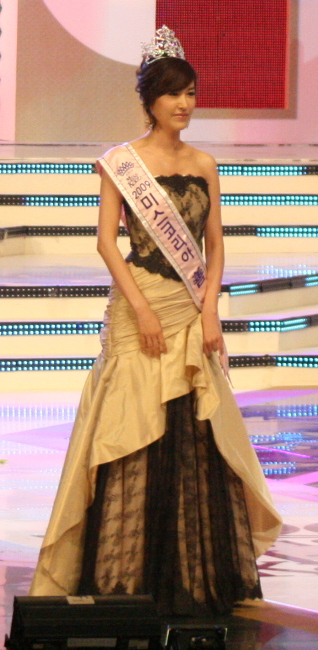 2009 미스코리아 당선자들